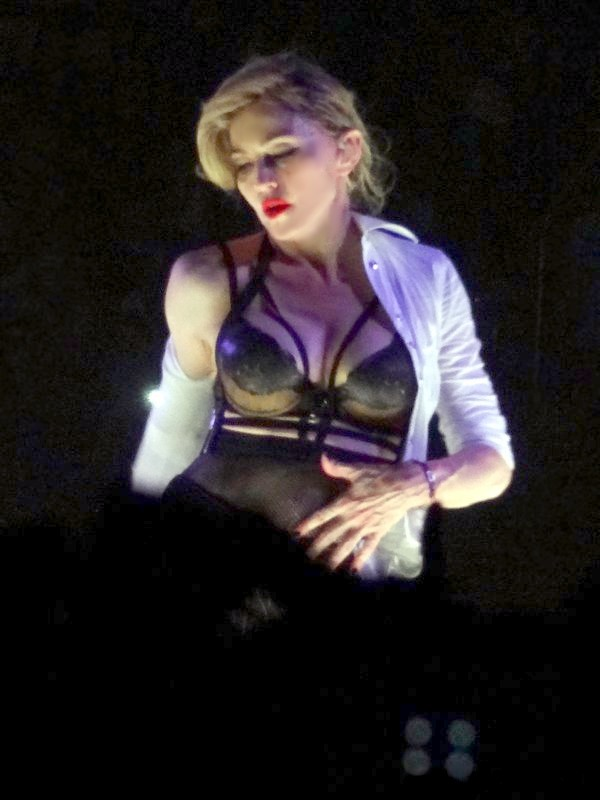 Madonna performing Human Nature during her concert in Berlin, Germany.